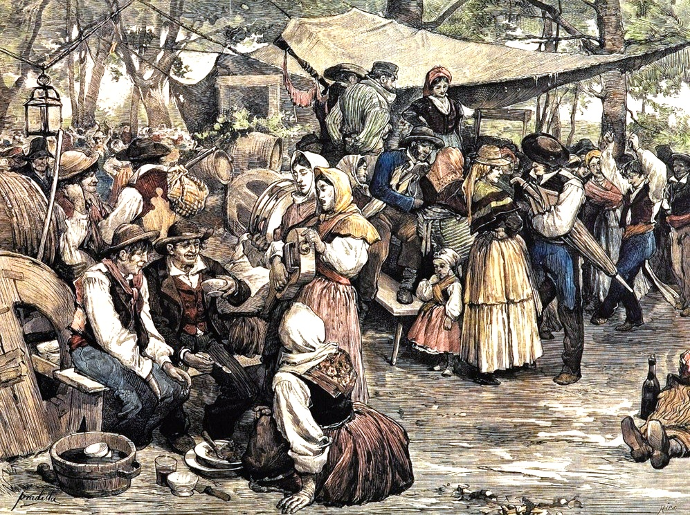 Tipos y costumbres populares. Galicia. Romería de San Cosme en Bayona.